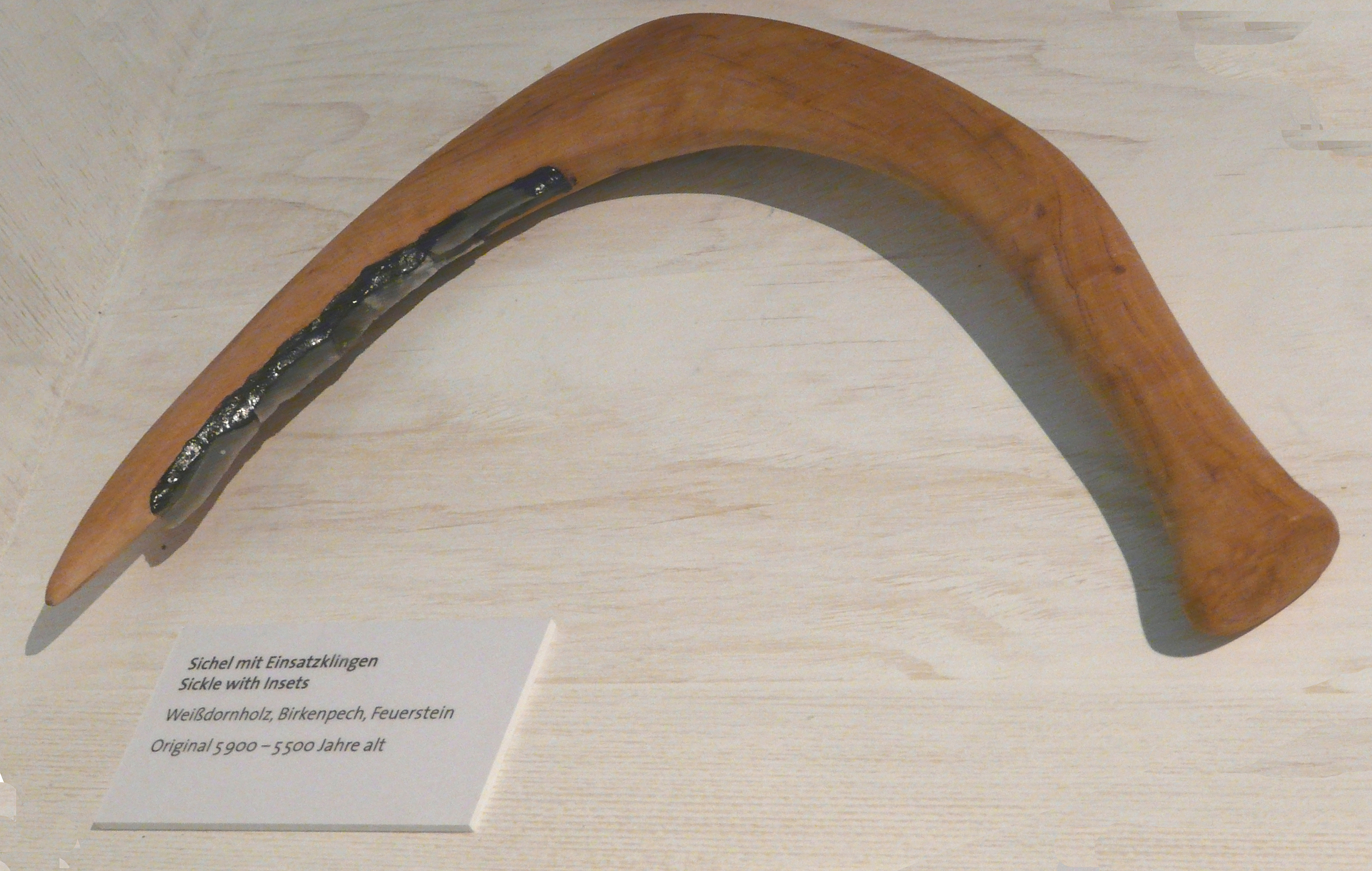 Rekonstruktion einer jungsteinzeitlichen Sichel im Neandertthal-Museum (Original 5.900 - 5.500 Jahre alt), Weißdornholz mit Feuersteinklingen